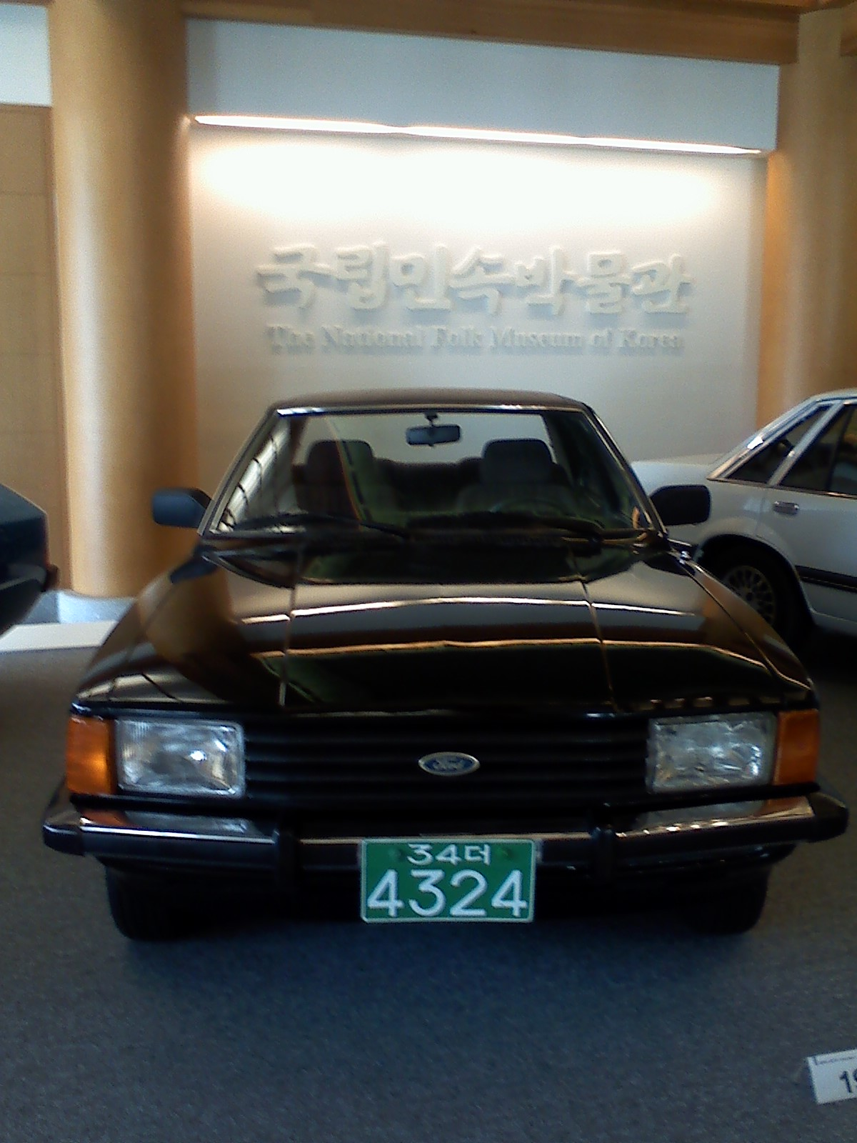 포드 코티나 마크5 이코노미-앞모습